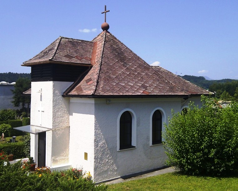 Evangelische Christuskirche, Gleisdorf